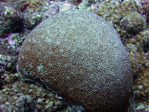 Astreopora myriophthalma, Samoa Americana